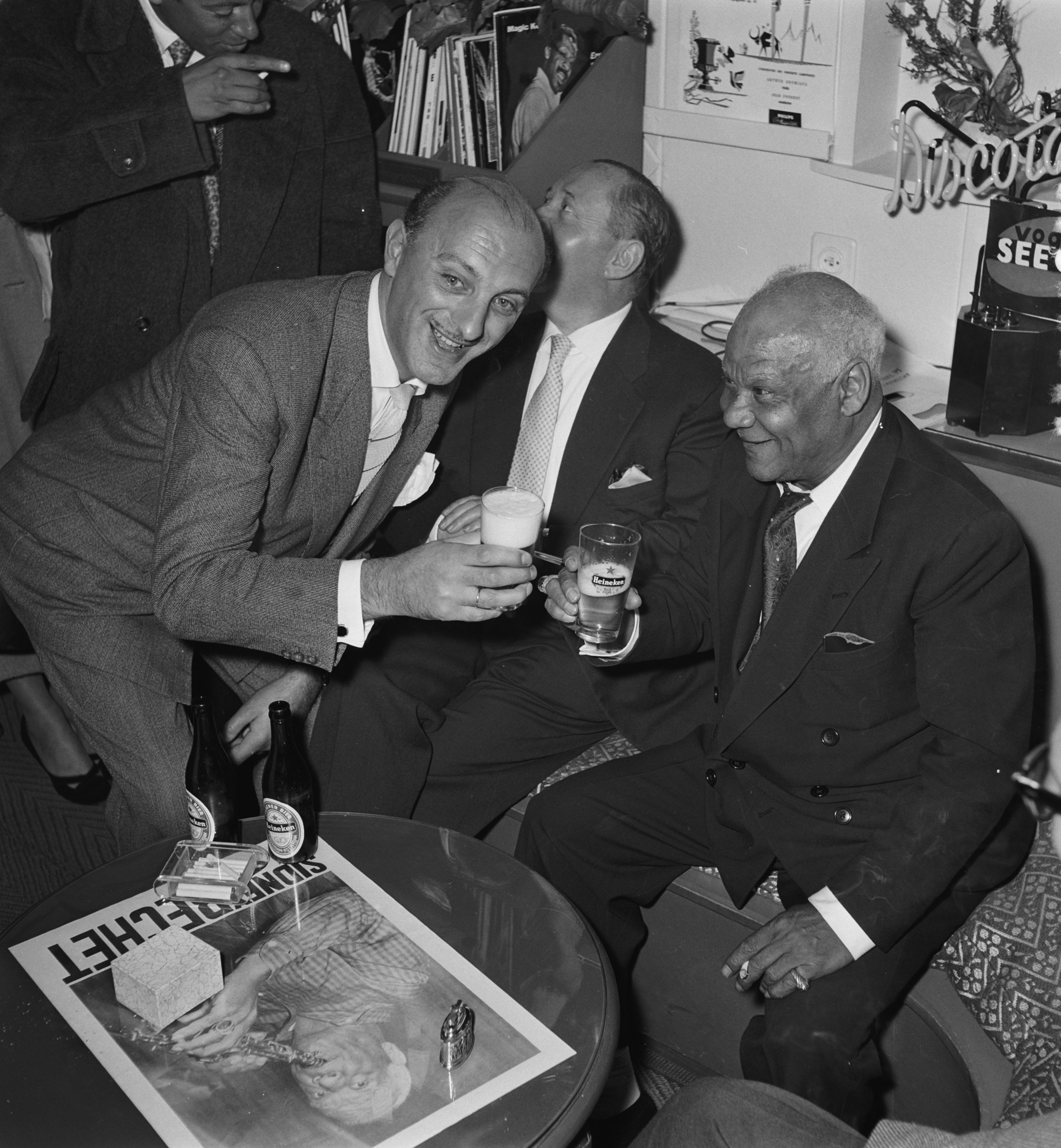 Sydney Bechet tekent grammofoonplaten bij "Discotone" eigenaar Hank van Leer L. Leidsedwarsstraat 17 ( 50 jaar jazz, sopraan, saxofonist). Amsterdam (NL), 6 oktober 1956